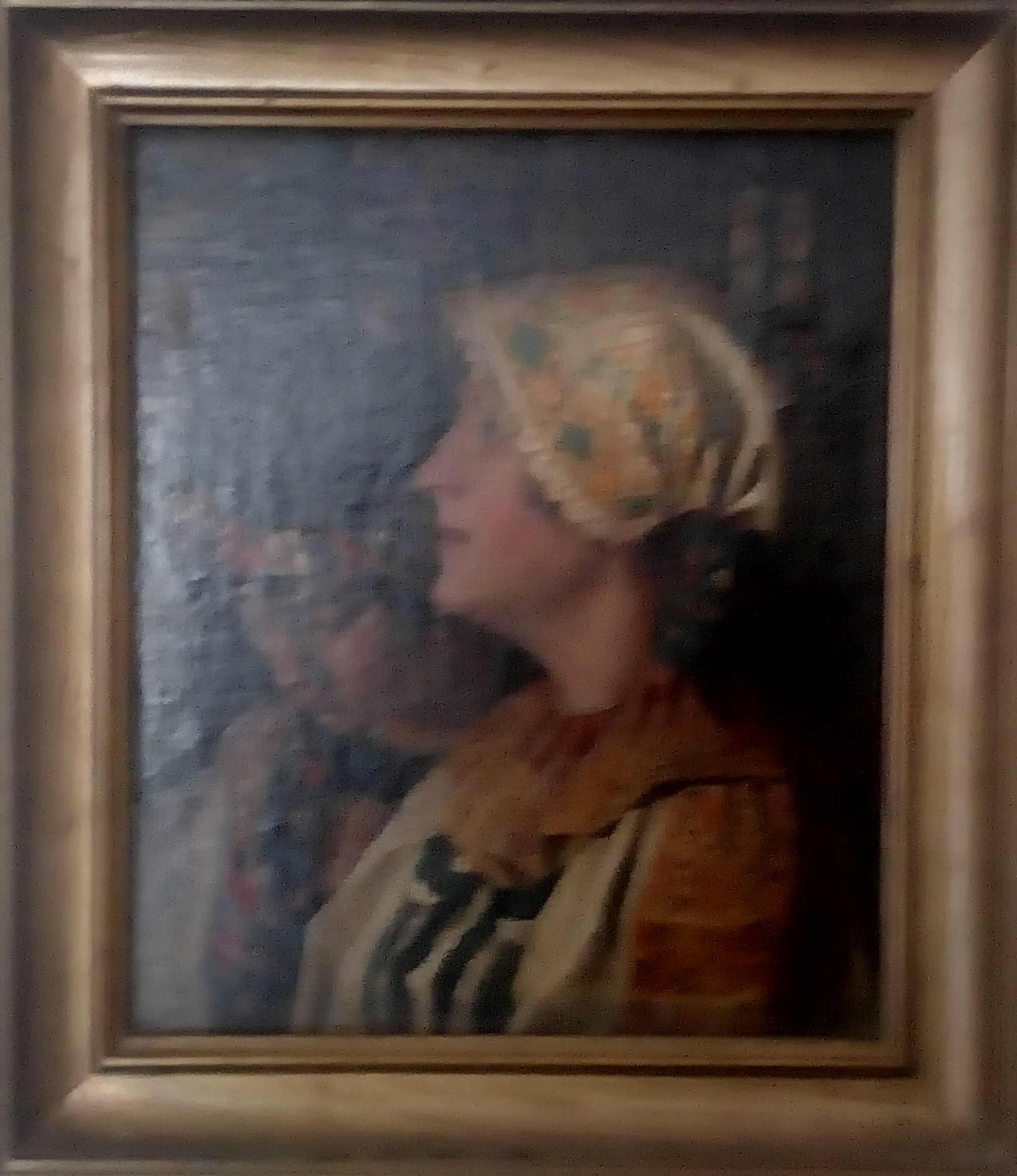 Portrét ženy v kroji